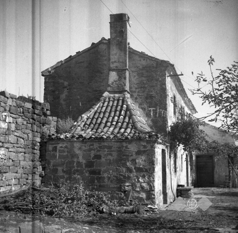 Pri Alešandrotu (gostilna), Tinjan.